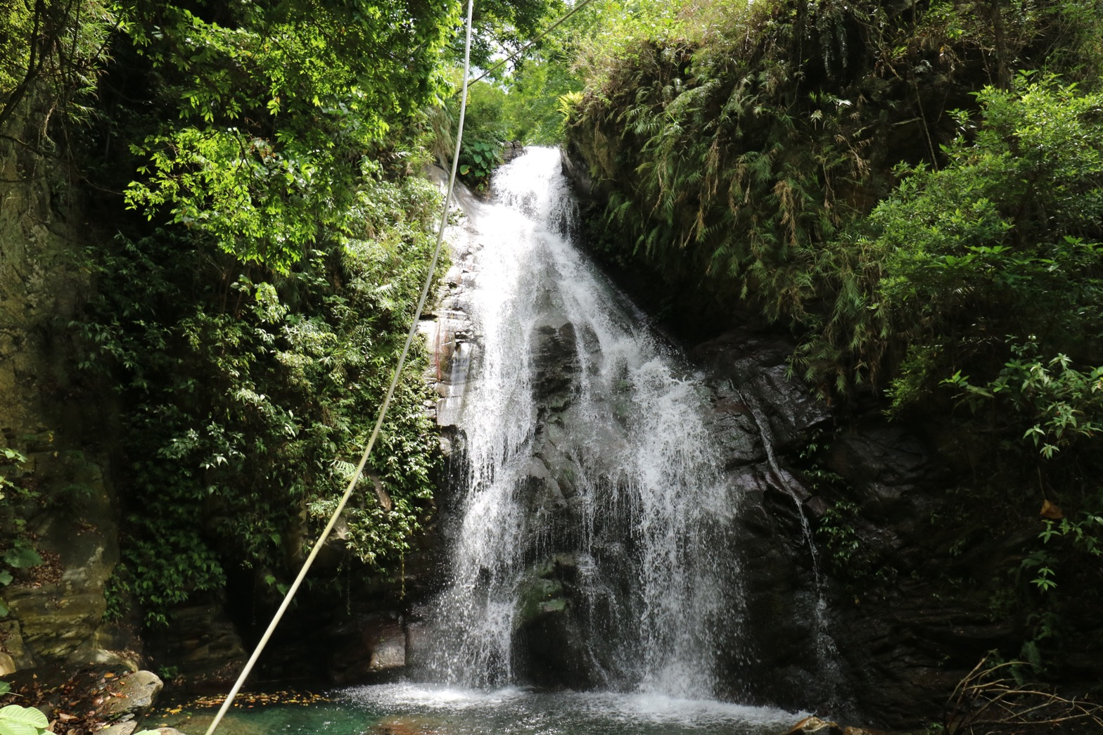 中文（台灣）: 臺灣臺東縣金峰鄉金峰瀑布第三層瀑布